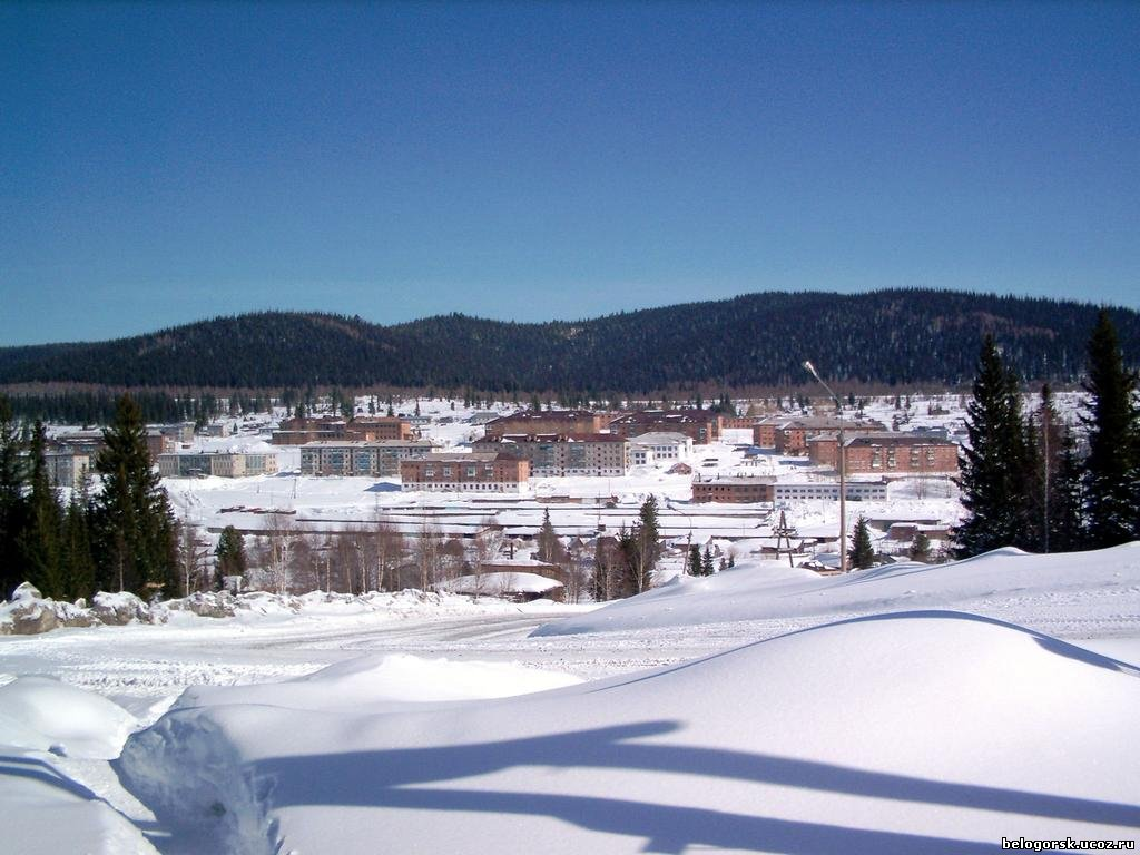 посёлок городского типа Белогорск.